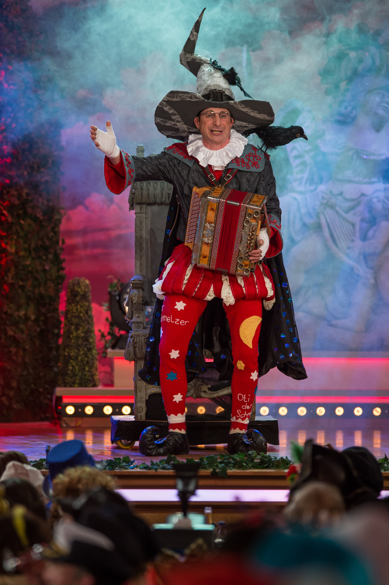 BR,Bayerisches Fernsehen,Fastnacht in Franken,Fastnachts-Verband Franken,Karneval,Live-Sendung,Mainfrankensäle,Oti Schmelzer